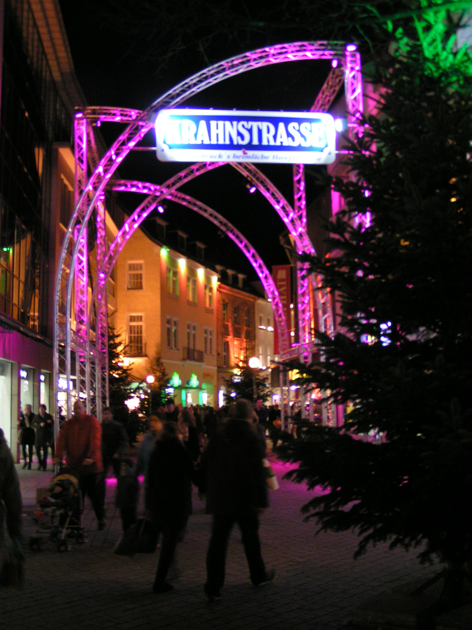 Osnabrück: Krahnstraße mit adventlich illuminierten Gebäuden